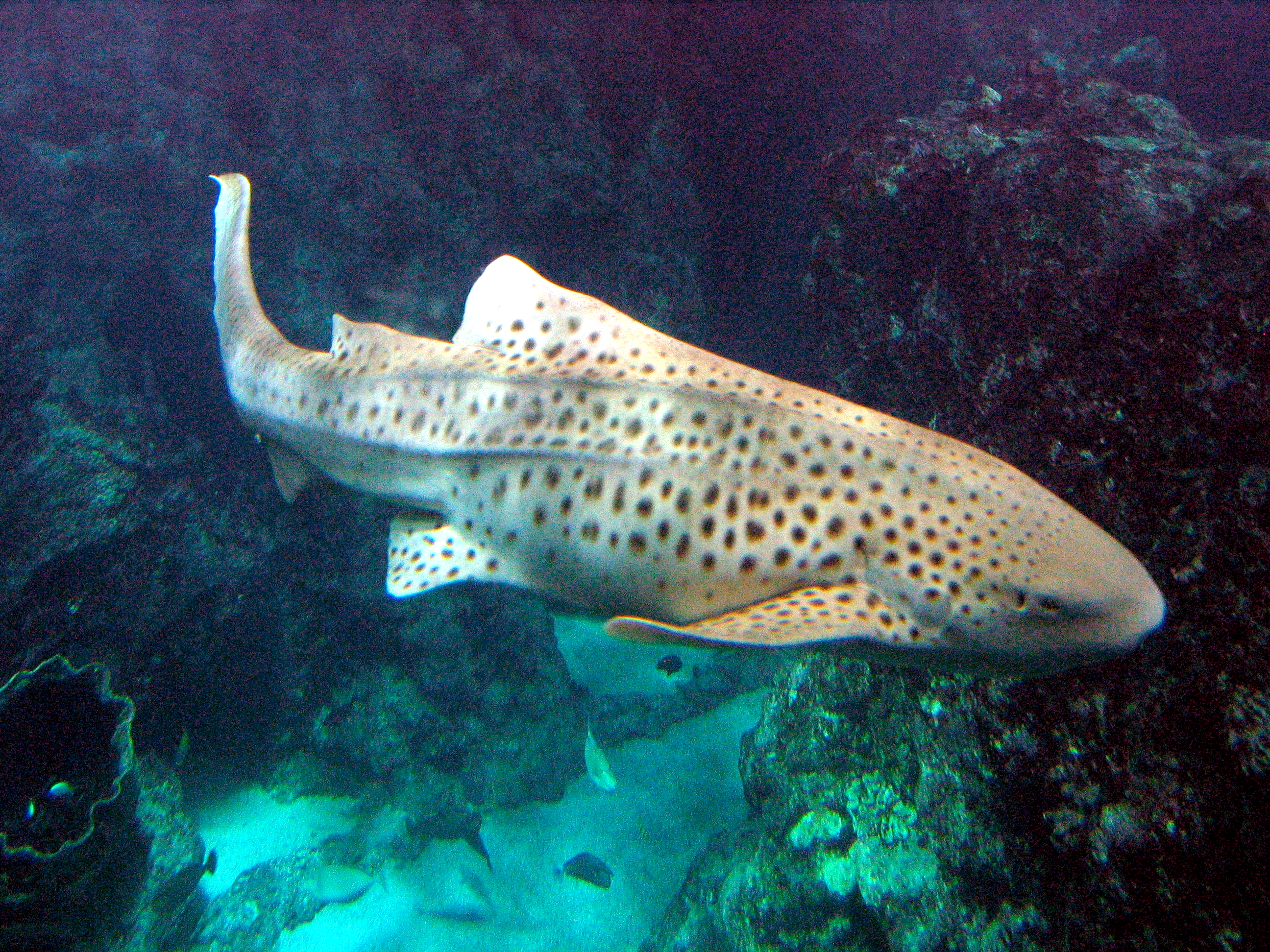 Les aquariums d'Océanopolis, Brest : Stegostoma fasciatum – Requin zèbre